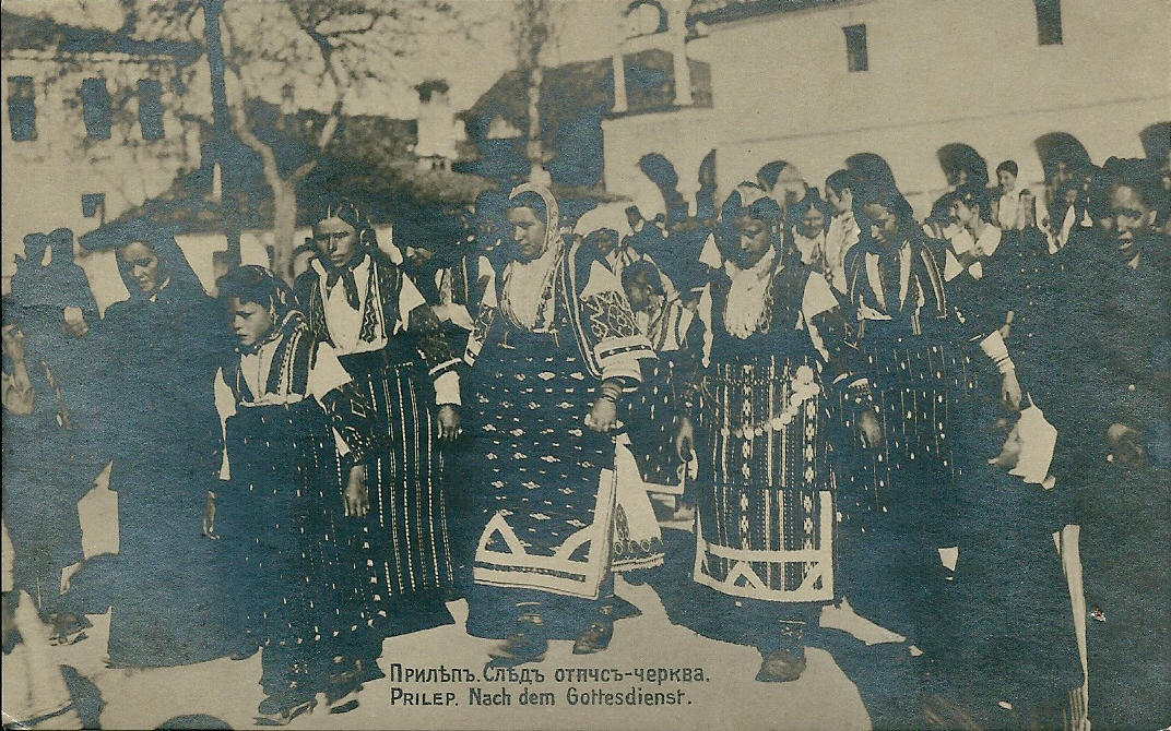 Après le service religieux à Prilep (Macédoine) avant 1919